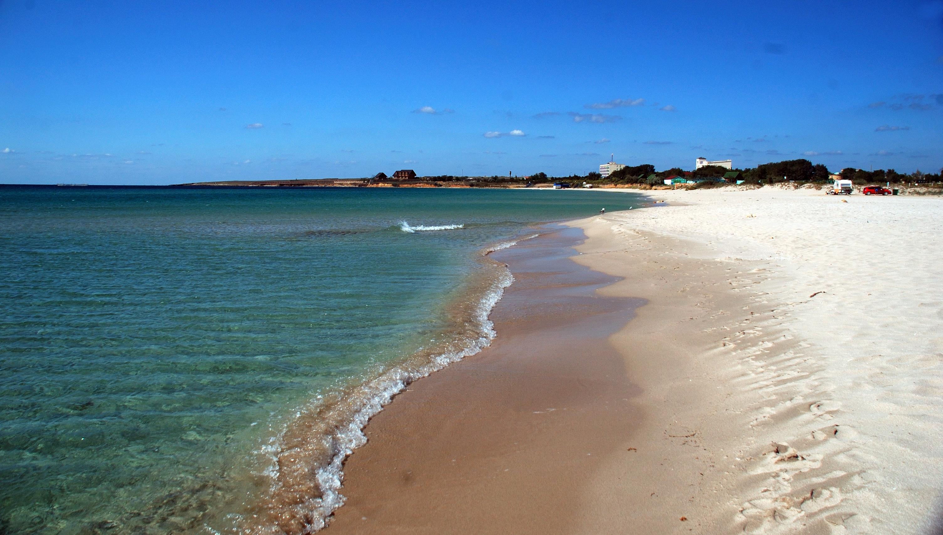 Пляж Караджинской бухты